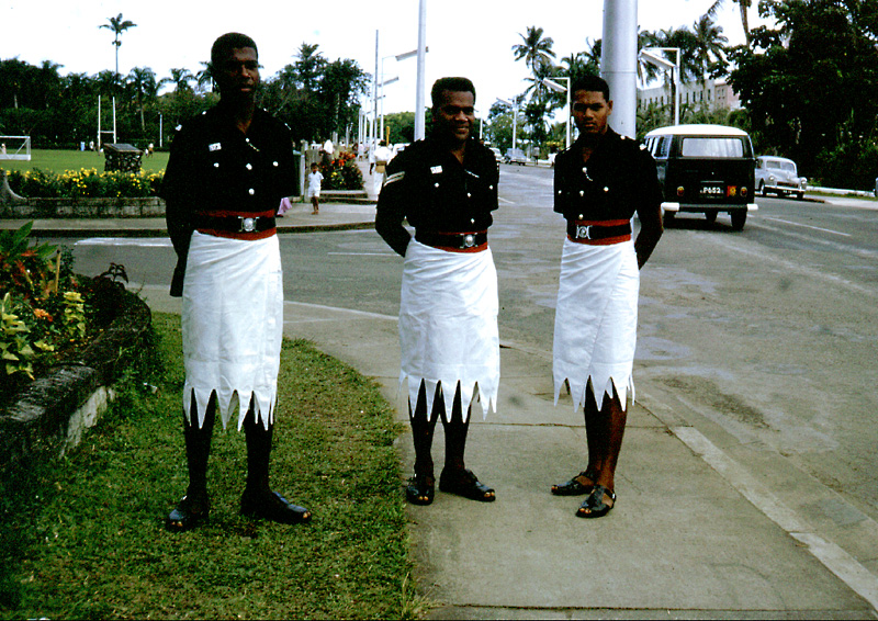 Fijian policemen, Suva July 1967